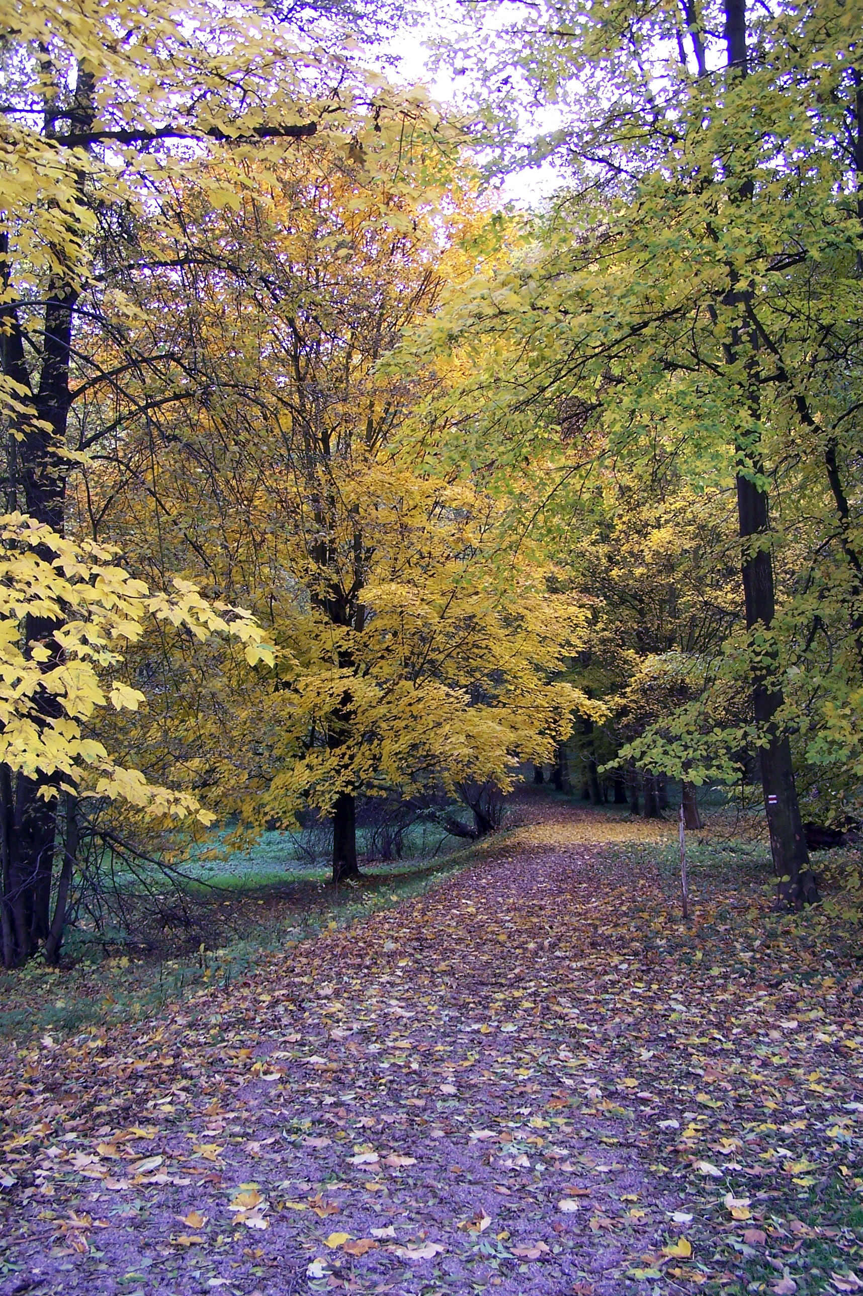 Choltická obora